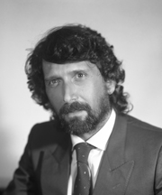 Senatore Francesco Greco